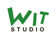 ウィットスタジオロゴマーク